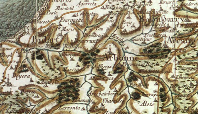 Arbonne (64210) sur la carte de Cassini